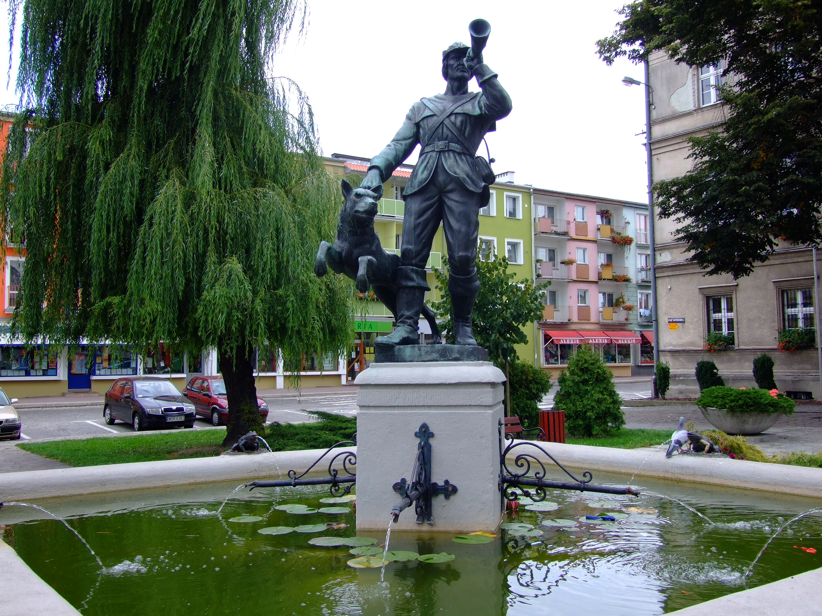 Pomnik myśliwca na rynku w Strzelcach Opolskich